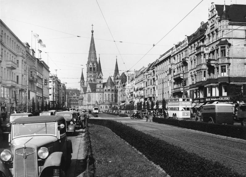 Berlin; Tauentzienstrasse und Gedächtniskirche ca. 1938